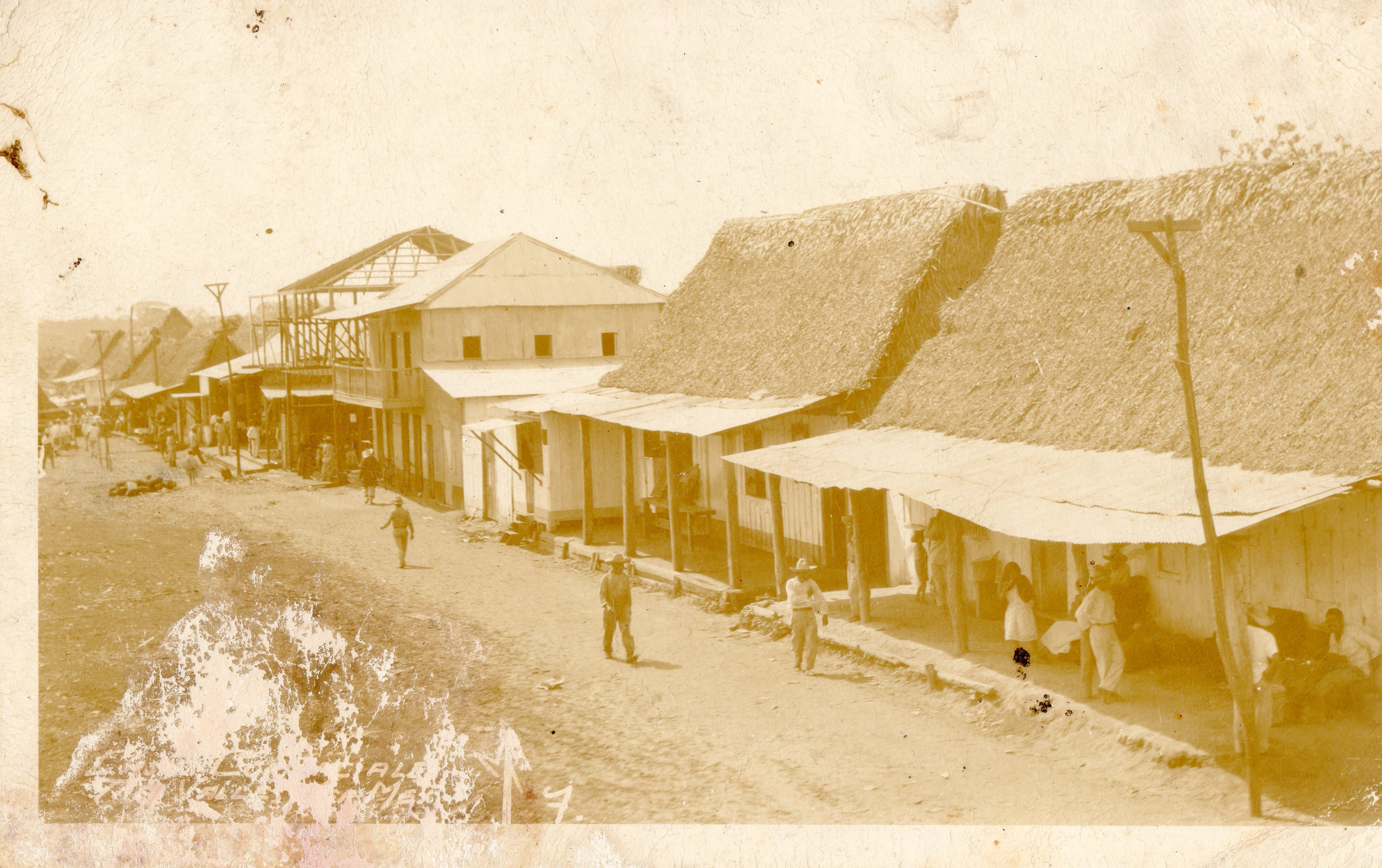 Toma de la actual calle Adolfo Ruiz Cortinez en la Ciudad de Tres Valles, toma realizada en el año de 1929 Esta imagen es obtenida de una fotografía de la colección personal del Sr. Almazan